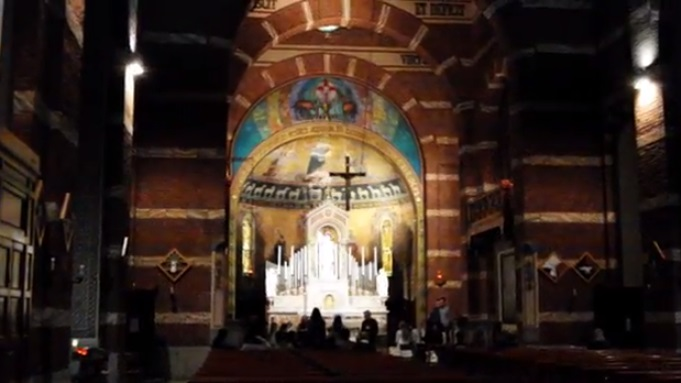 Interno della chiesa parrocchiale dei Santi Carlo e Luigi di Pontevecchio - Magenta (MI)